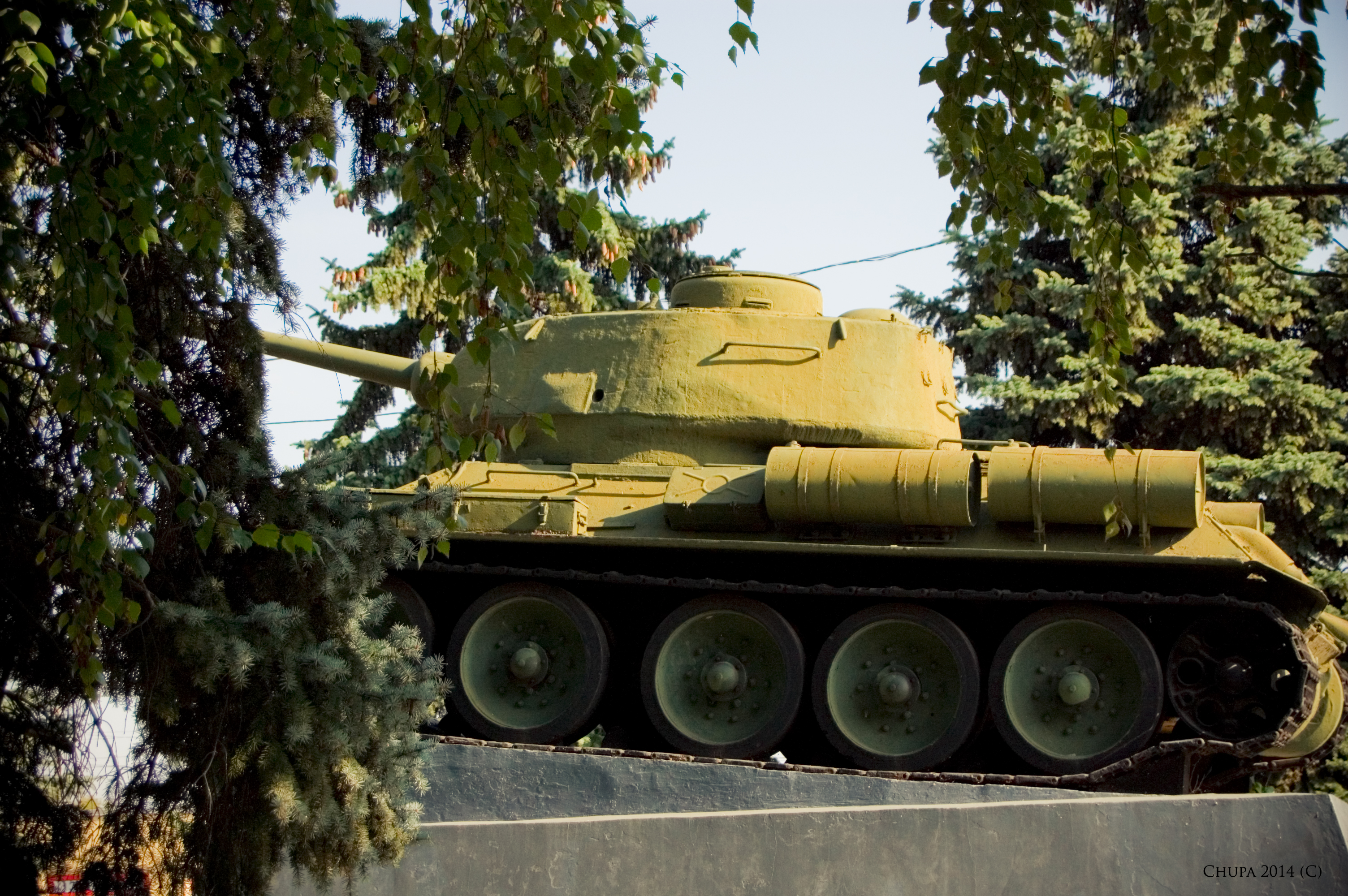 Братська могила радянських воїнів., Первомайський, пл. ім. Леніна